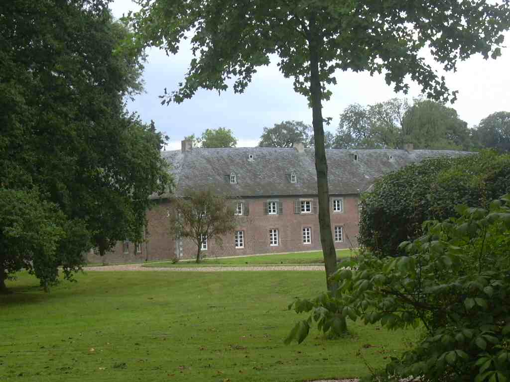 Müddersheim (Vettweiß), Burgpark own work papa1234 2006-08-11